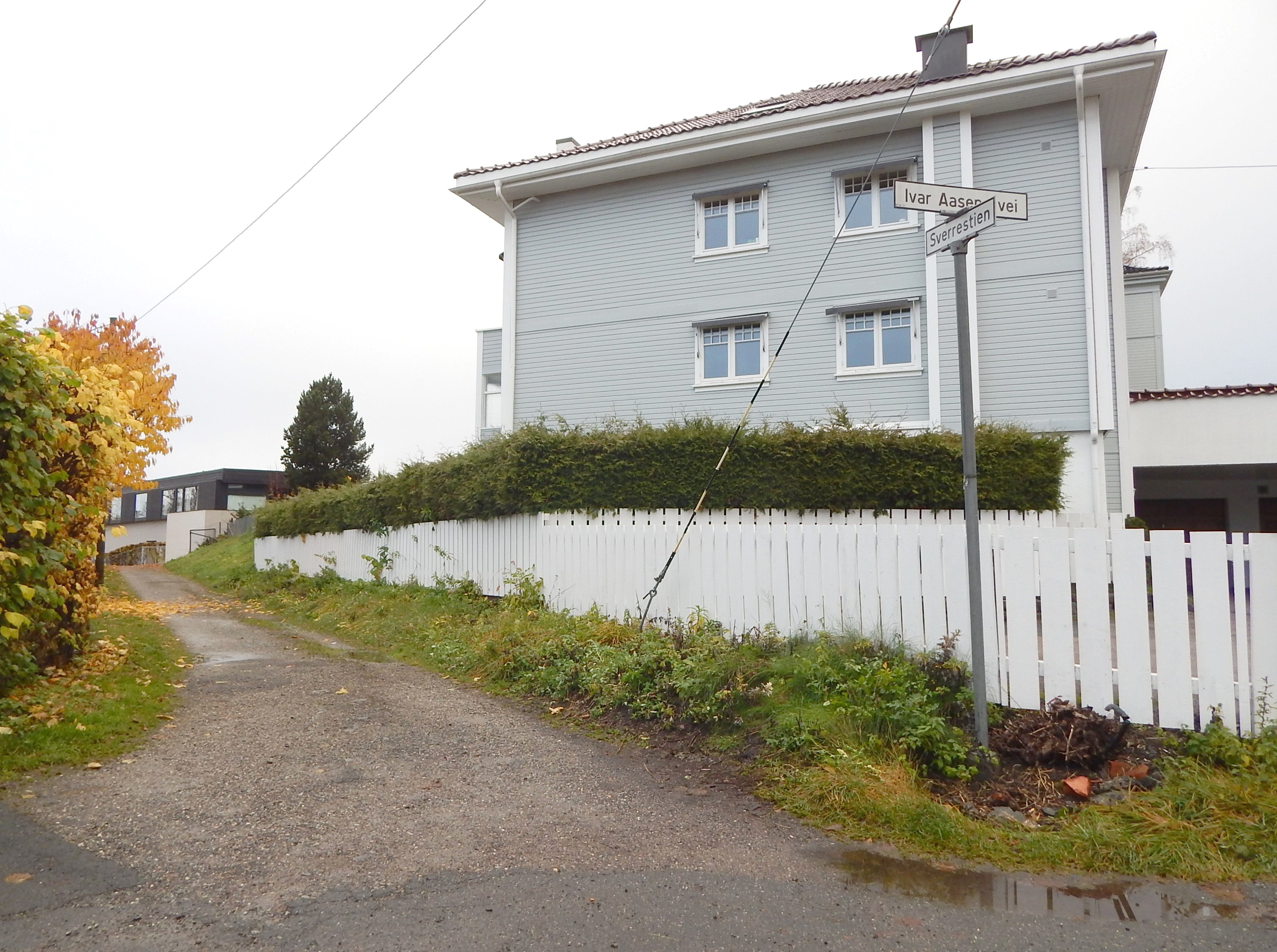 Sverrestien sett fra Ivar Aasens vei